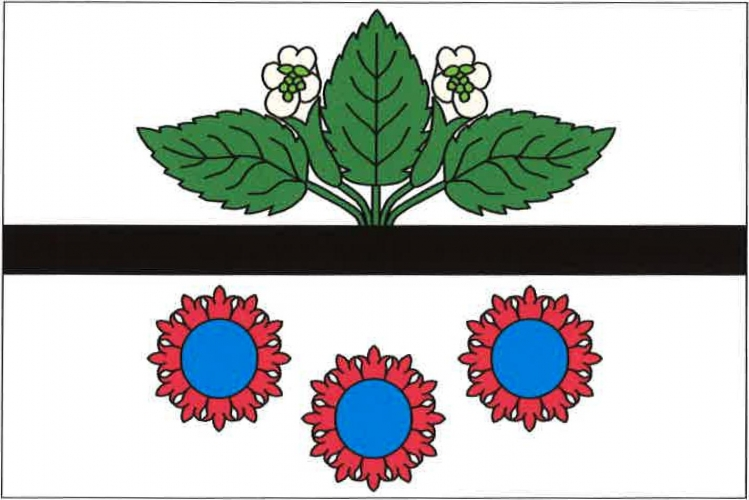 vlajka, Doubravice, okres Trutnov